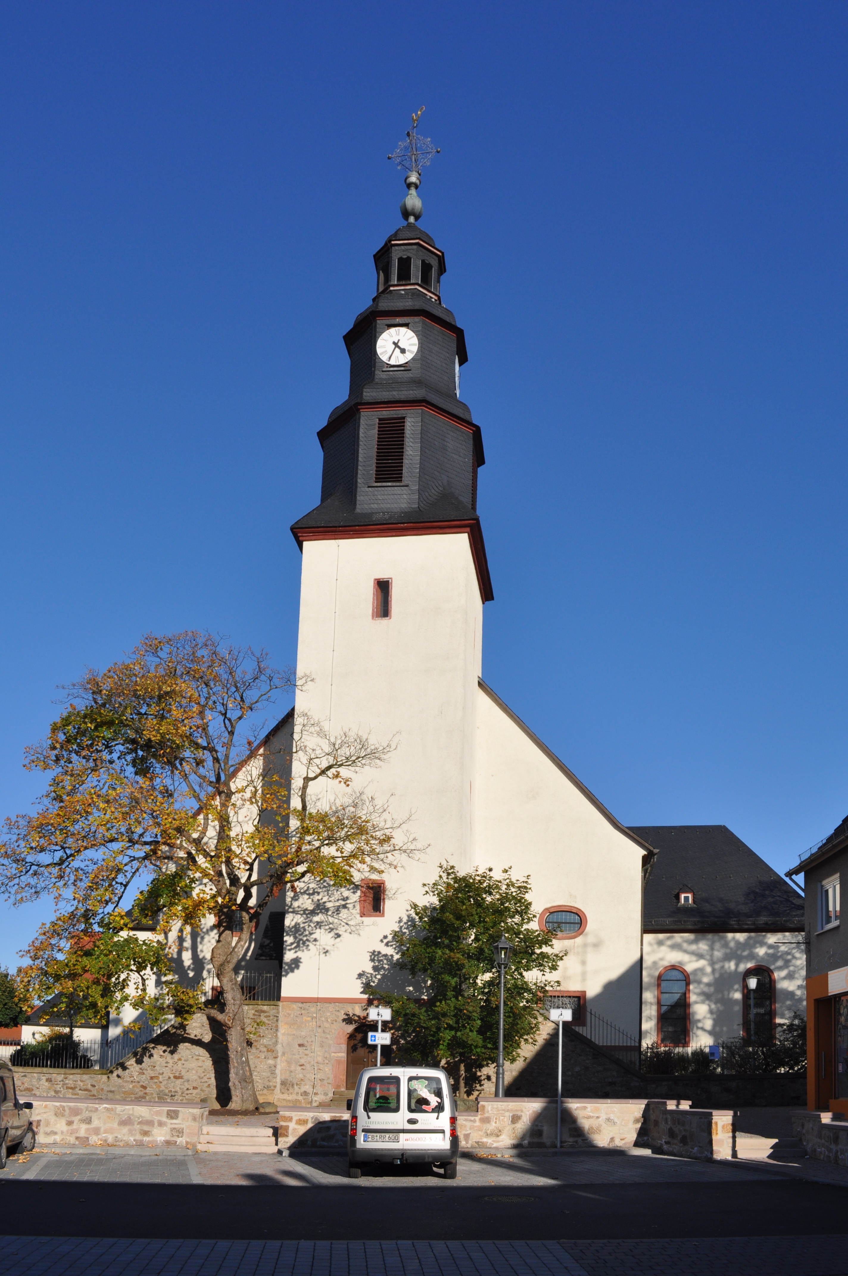 Ober-Mörlen, Katholische Kirche, Frontansicht